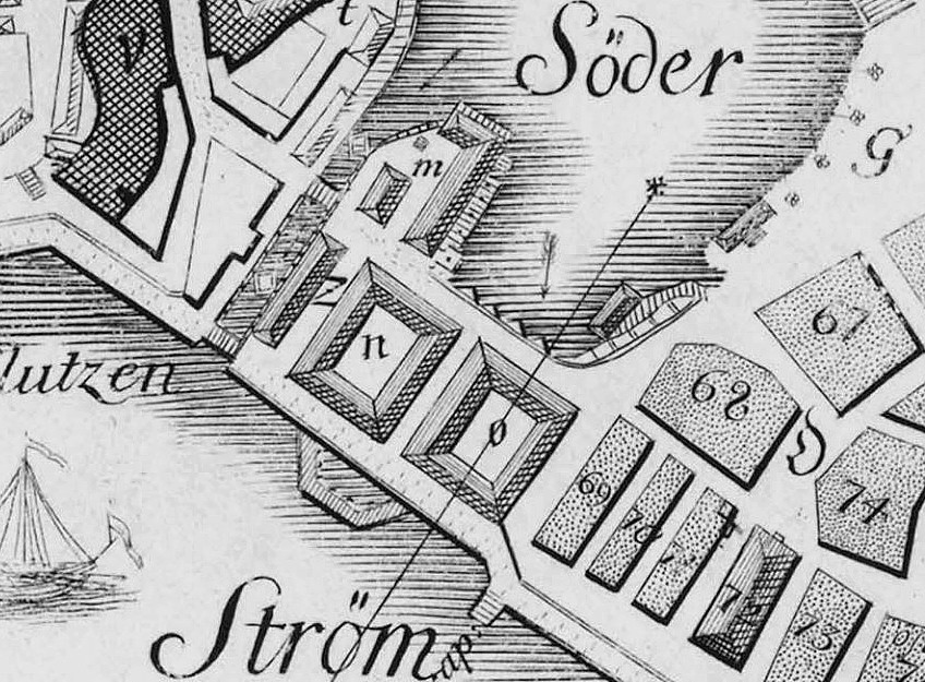 Del av Petrus Tillaeus Stockholmskarta visande Slussen (norr är till höger). "Södra Quarn" och "Slacktarhuset" (litt o), "Södra Fiskarhus (litt n).